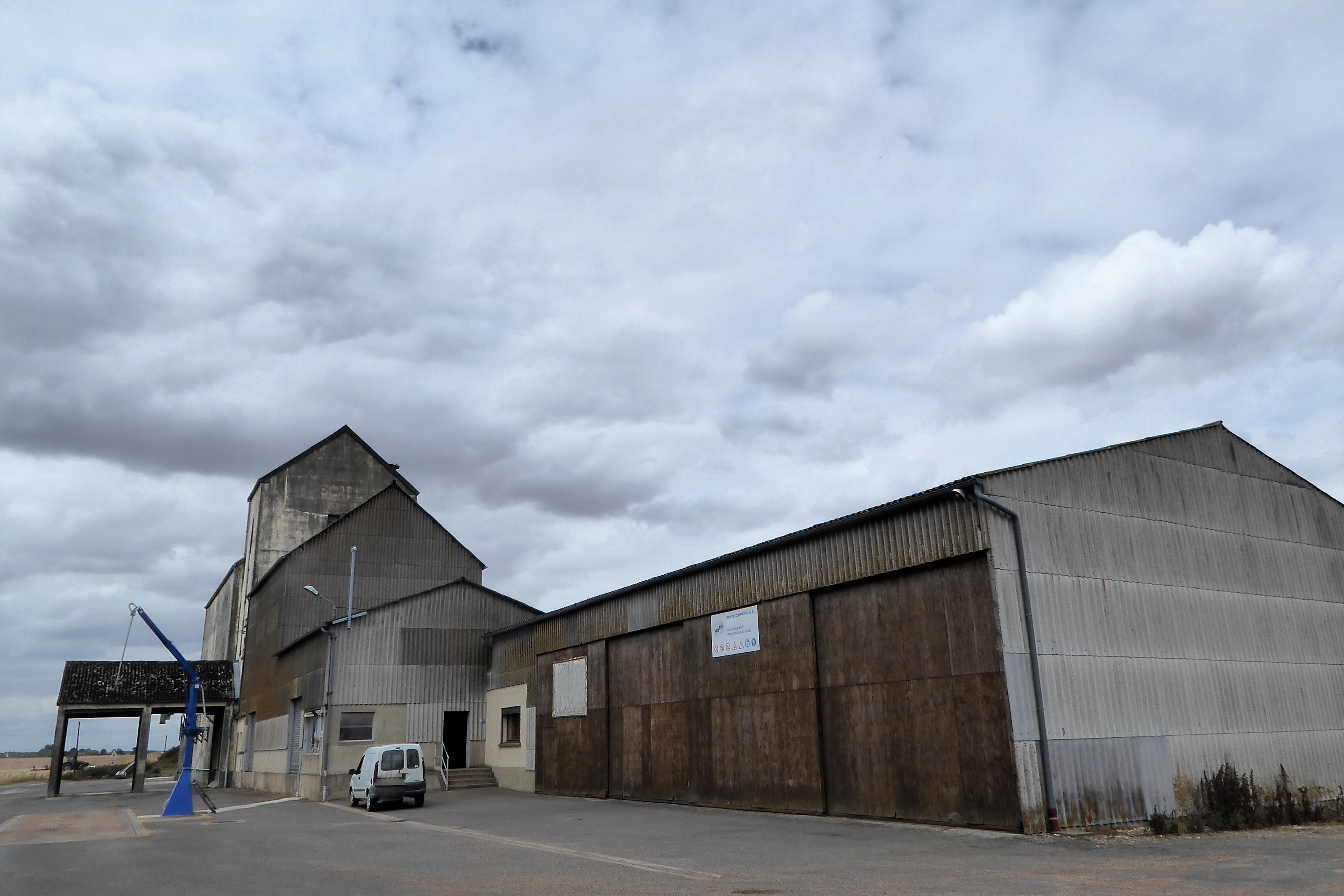 silo SCAEL, Bailleau-l'Évêque, Eure-et-Loir (France).